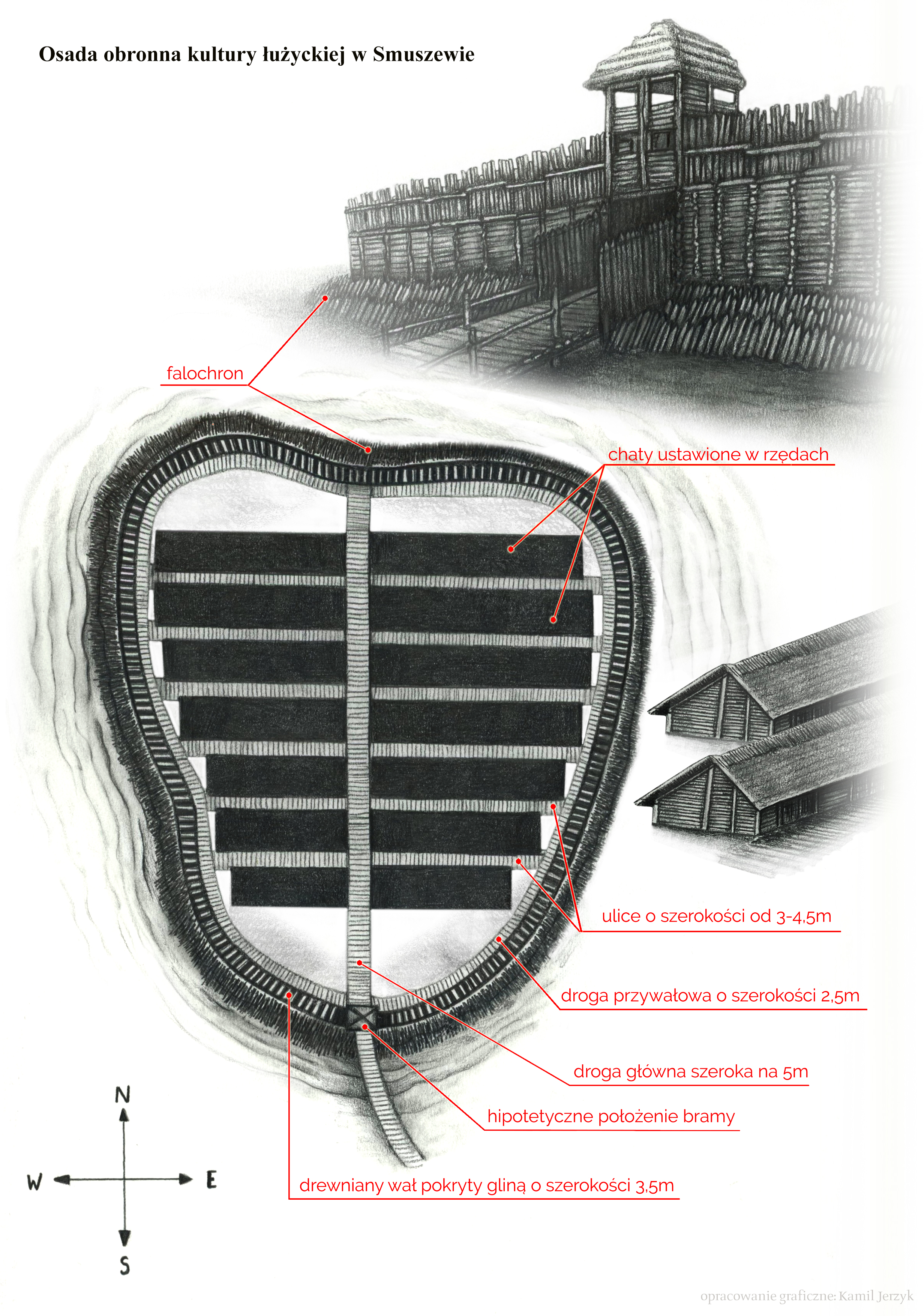 Osada obronna kultury łużyckiej w Smuszewie (opracowanie: Maciej Bodus, rysunki: Kamil Jerzyk)